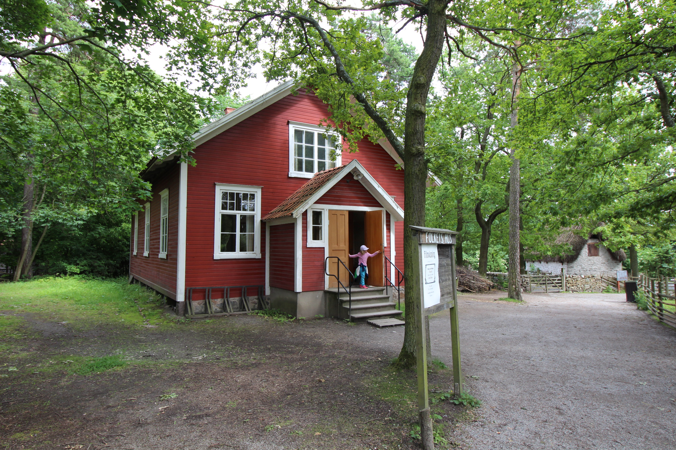 Folkets hus, Skansen, Stockholm, Sweden